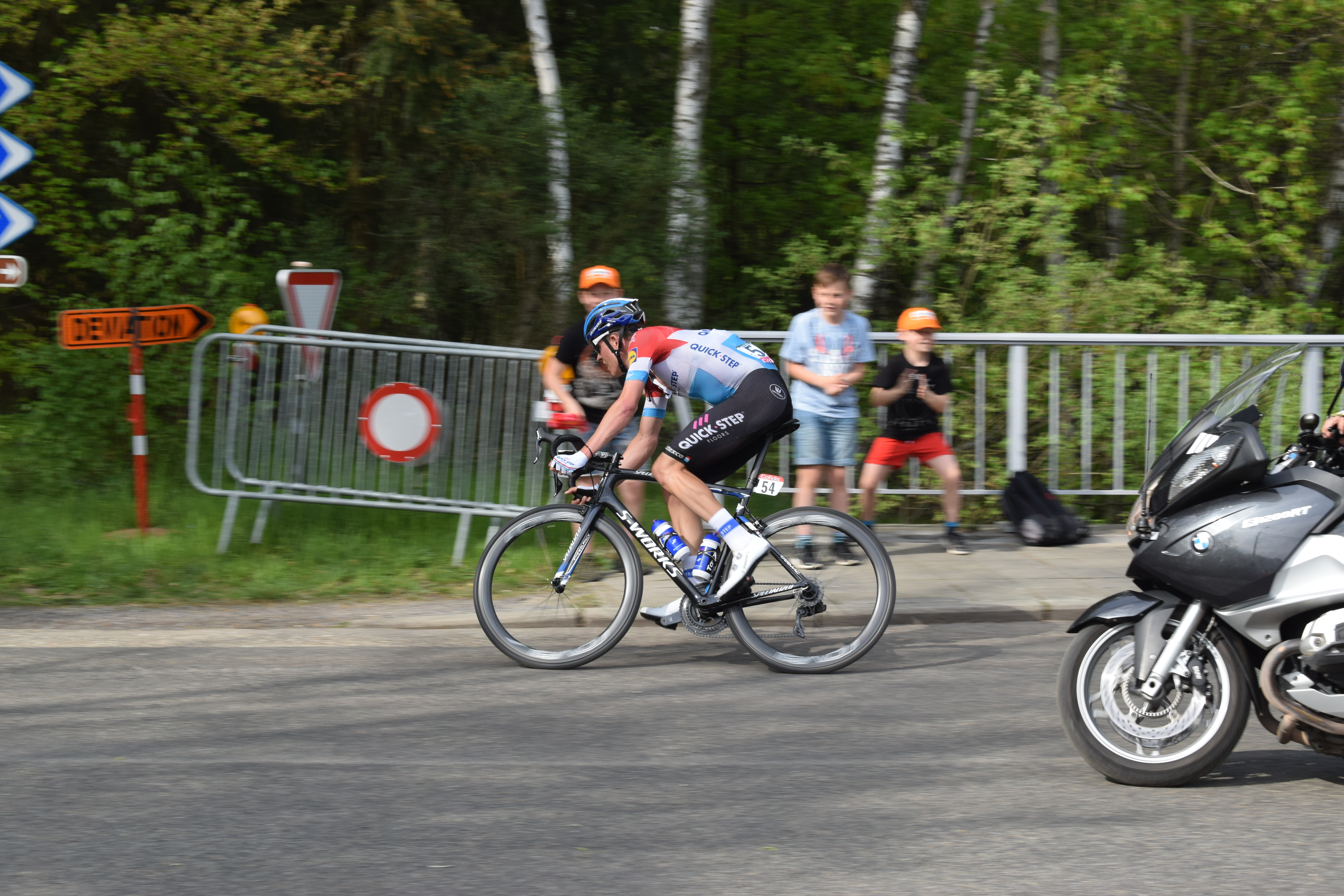 Vue du passage de la course cycliste "Liège-Bastogne-Liège", le dimanche 22 avril 2018, au chemin des Chevreuils (Sart Tilman) à Liège.